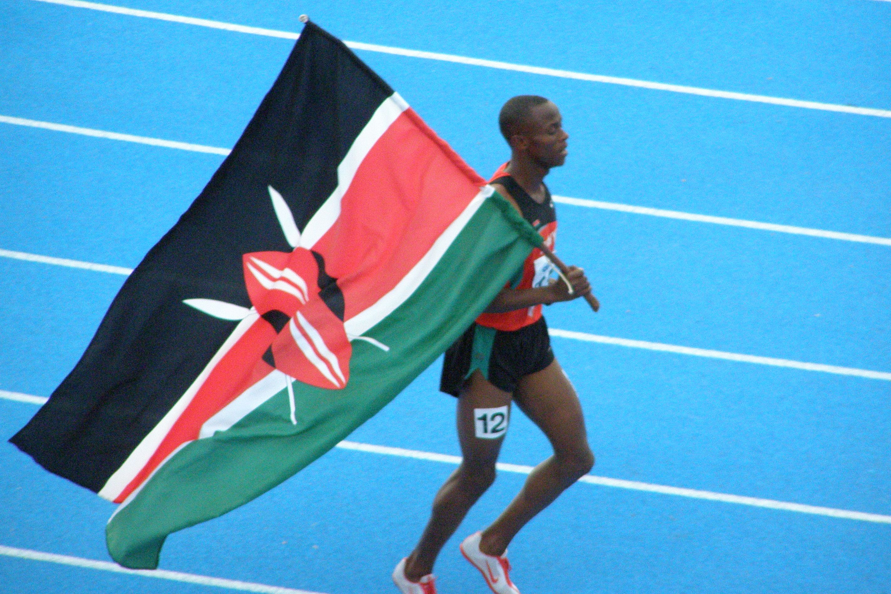 Mistrzostwa Świata Juniorów w Lekkoatletyce - Bydgoszcz 2008 - Fredrick Musyoki Ndunge